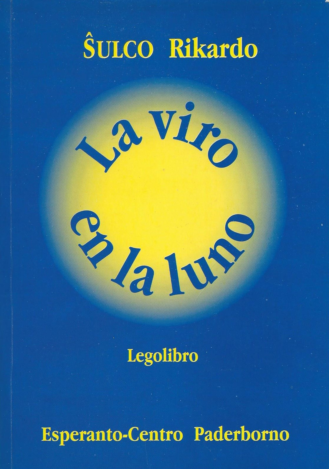 kovrilo de "La Viro en la Luno", 1994